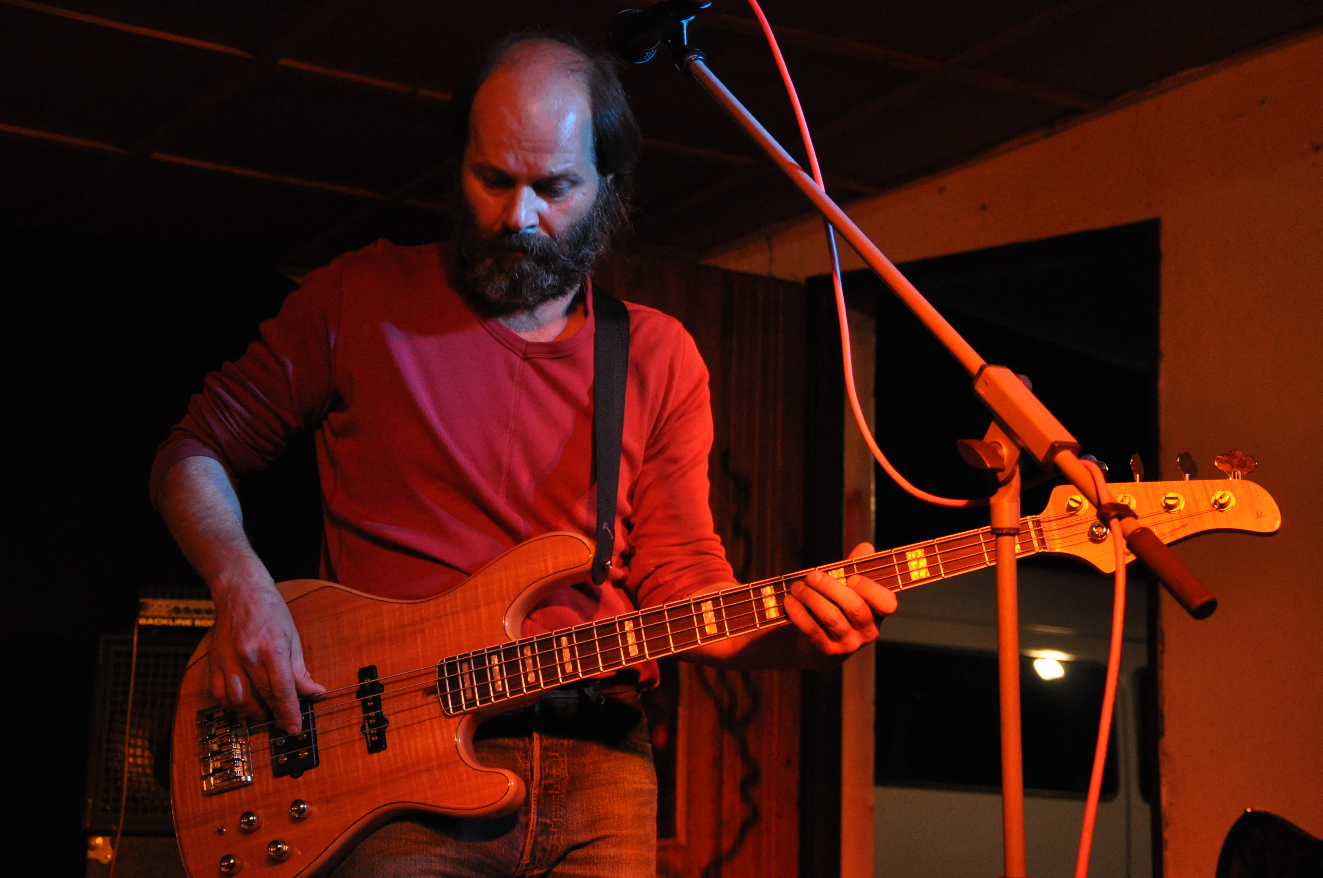 Oboroh na festivalu Otevřeno Jimramov 2009